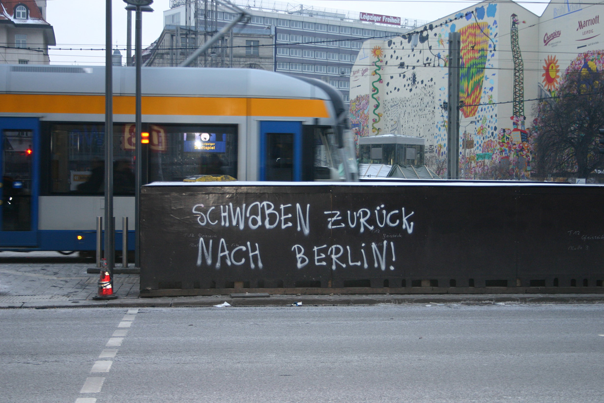 Sprüherei gegen Schwaben am Leipziger Hauptbahnhof, 2013.